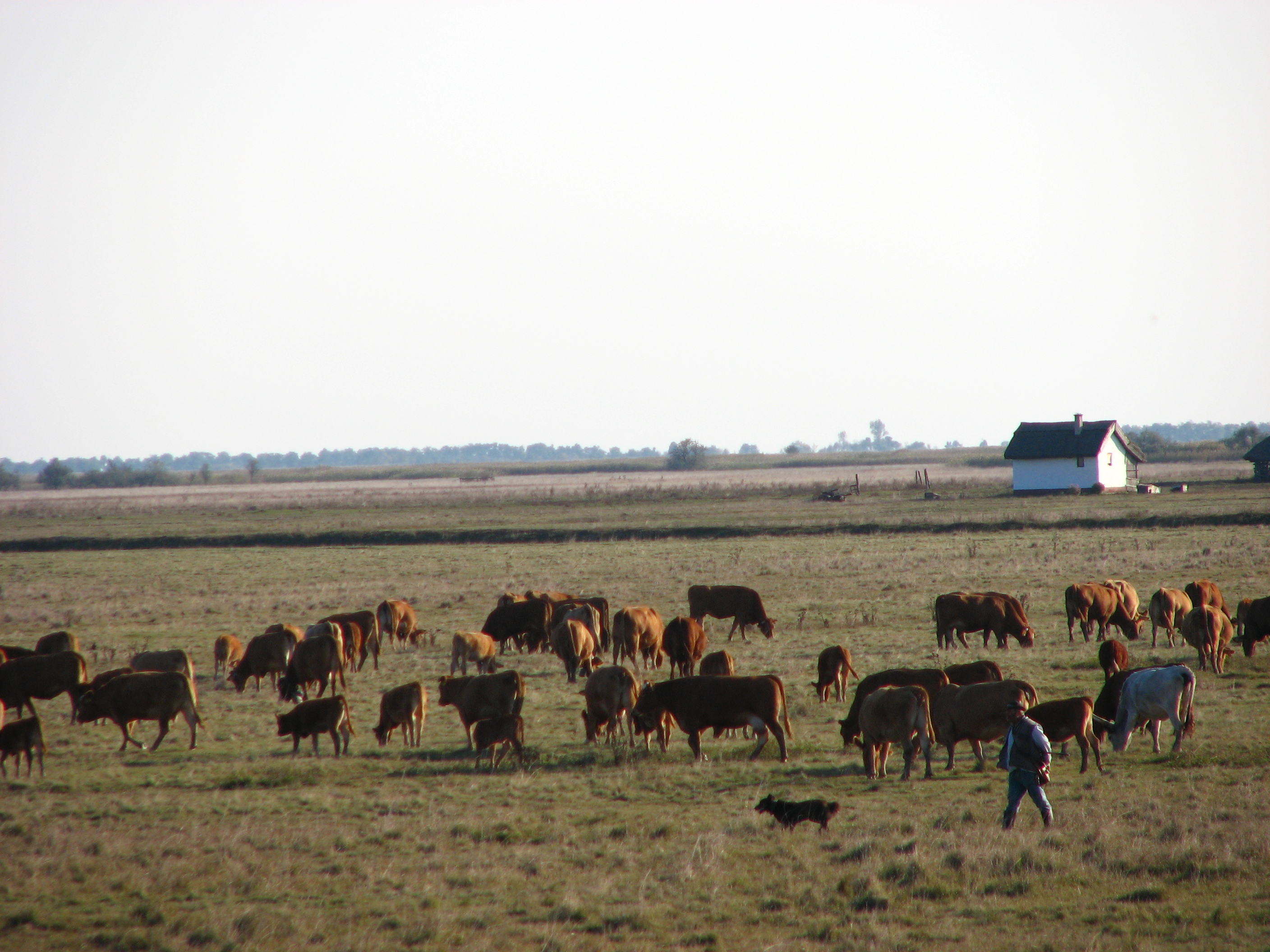 Gulya és gulyás